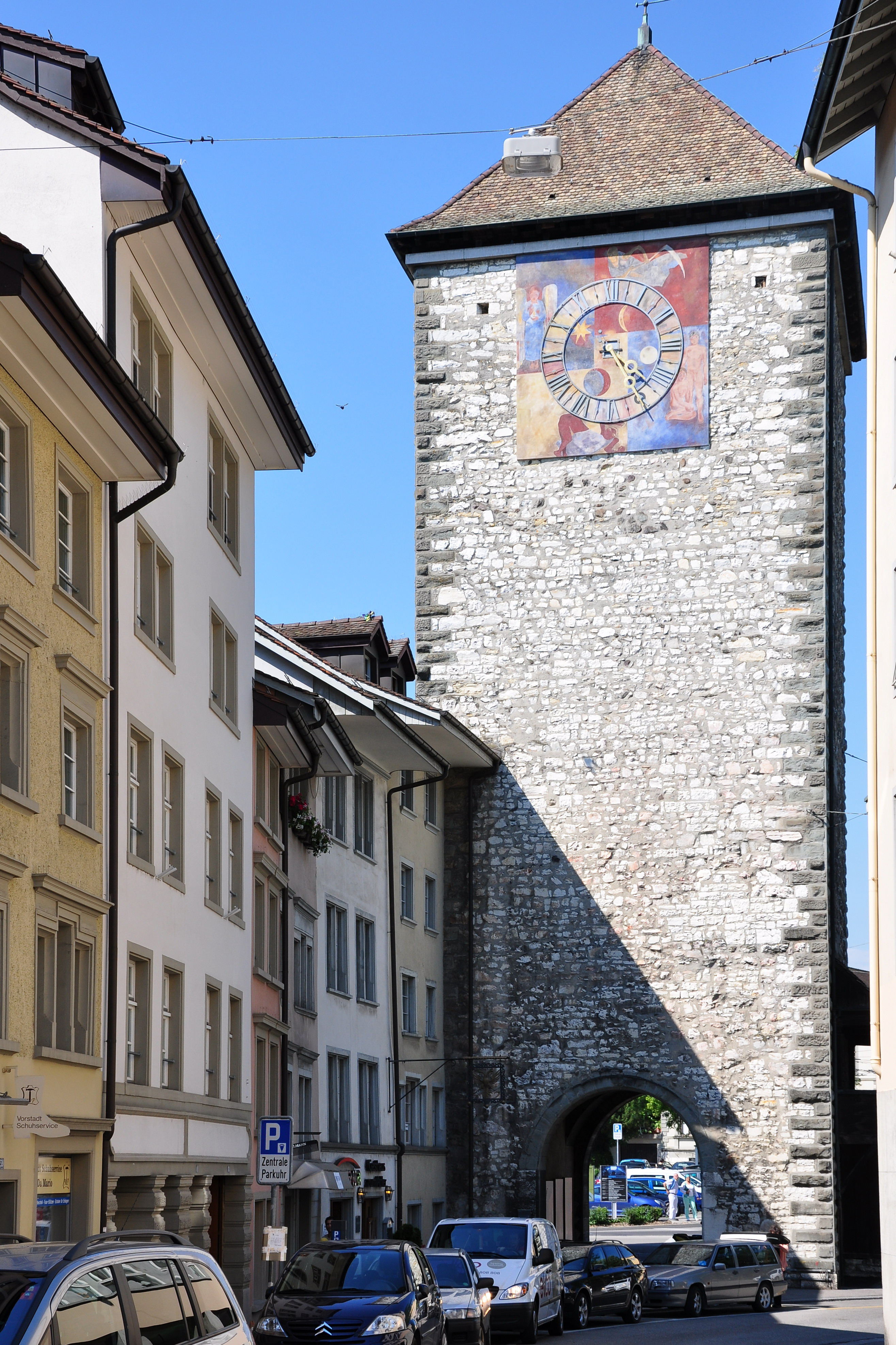 Vorstadt in Schaffhausen (Switzerland)